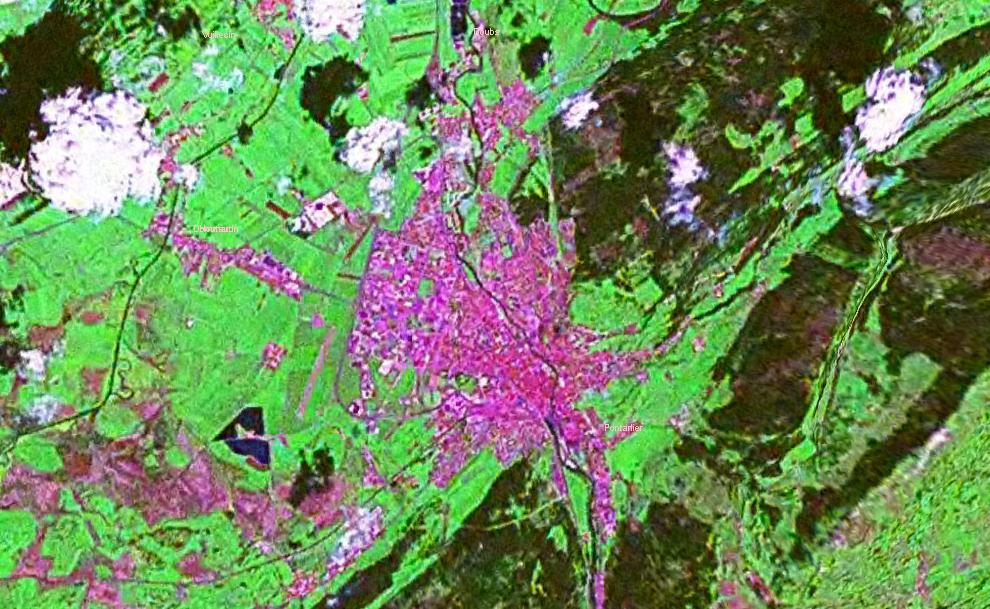 Vue satellite Lansat de Pontarlier (France)